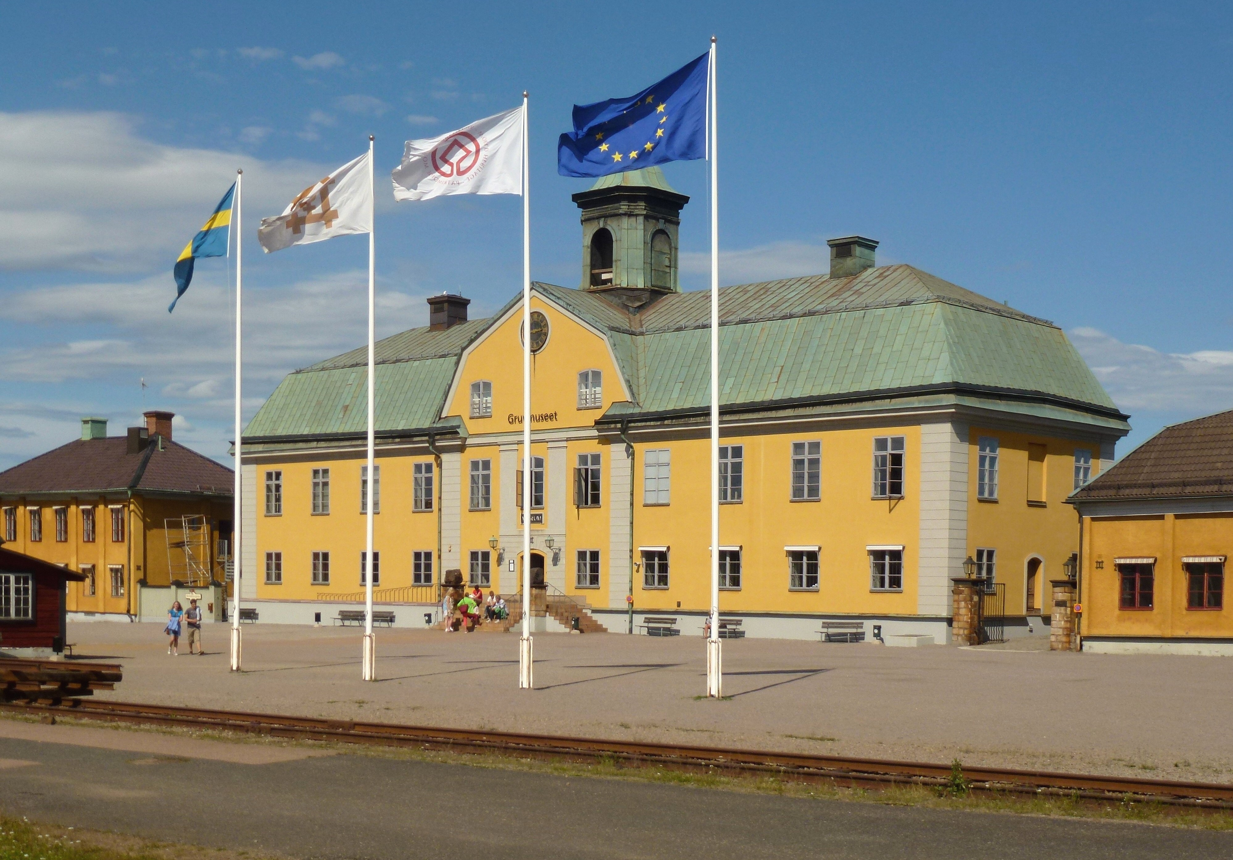 Falu koppargruva, Gruvmuseum